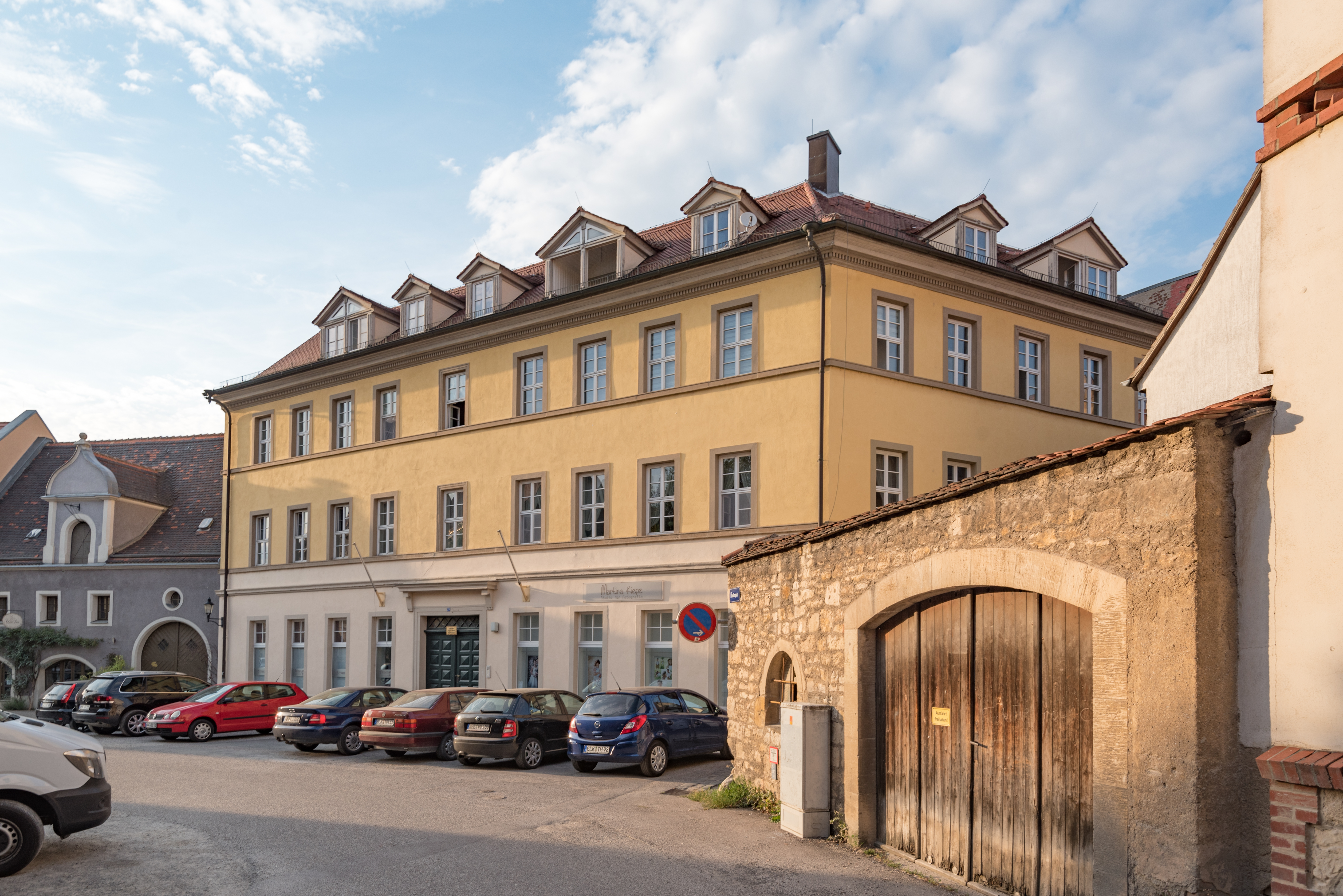 Naumburg (Saale), Reußenplatz 20, 18